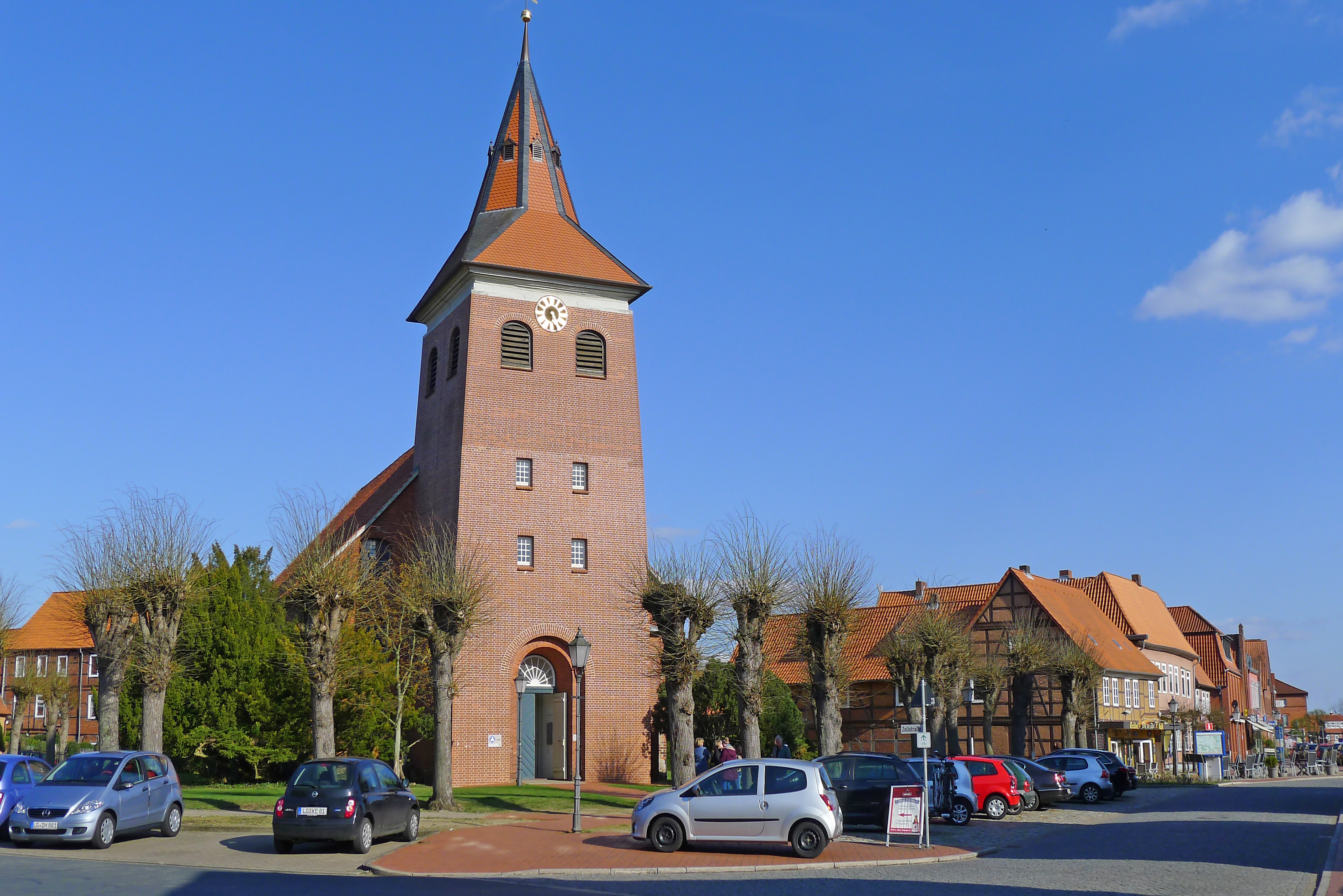 St. Jakobikirche in Bleckede